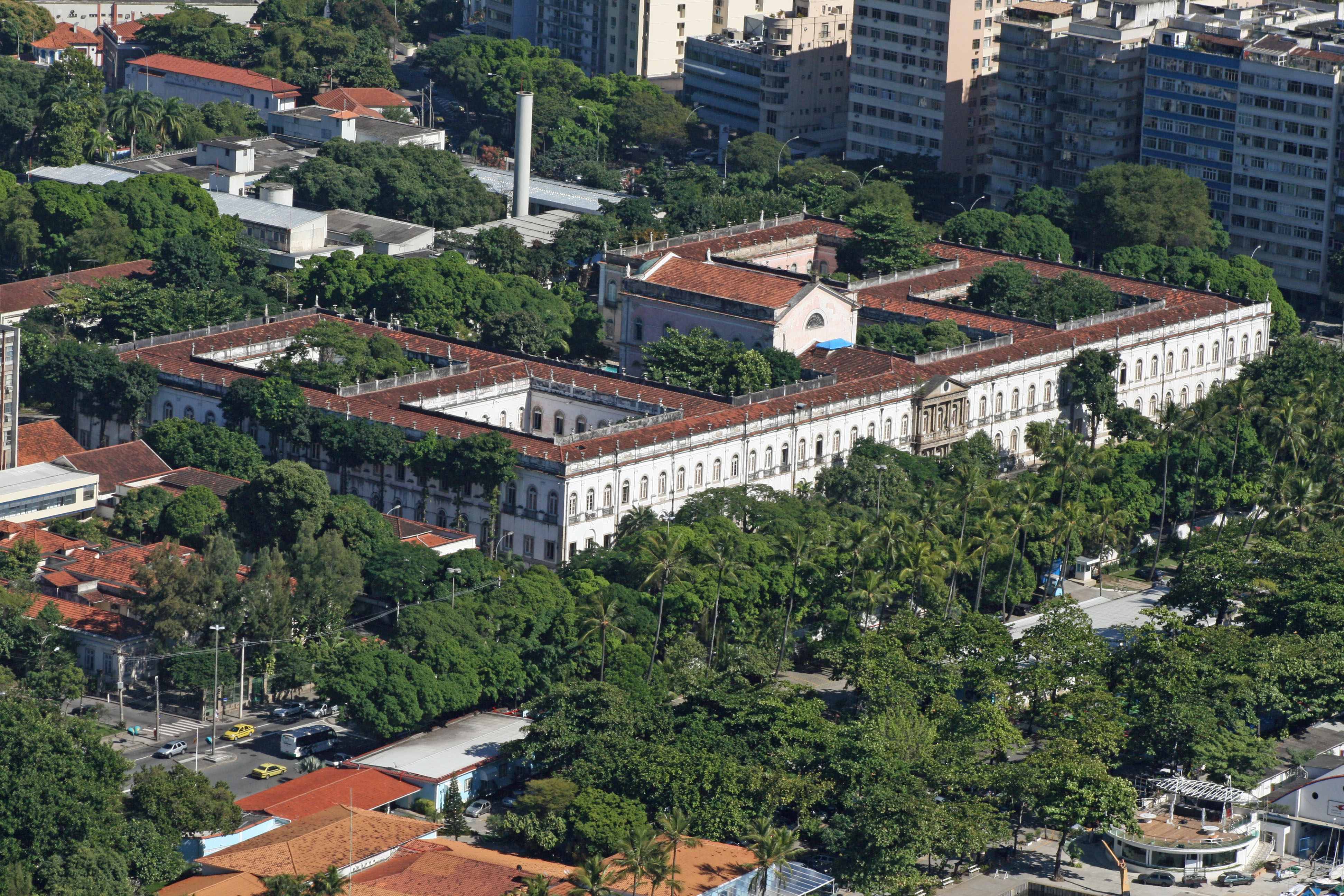 Campus da Praia Vermelha da Universidade Federal do Rio de Janeiro - Avenida Pasteur 250.